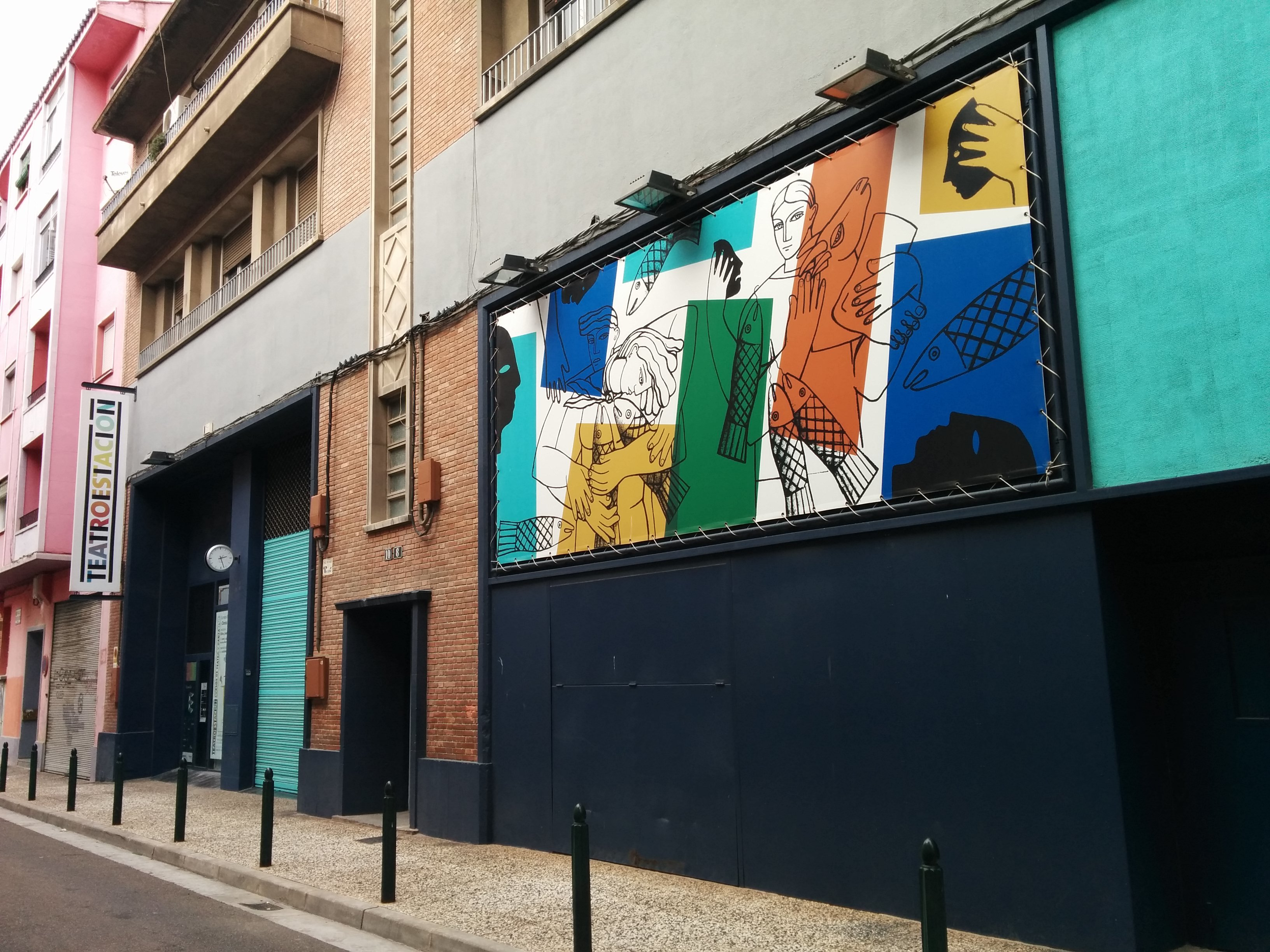 Teatro de la Estacion en Zaragoza